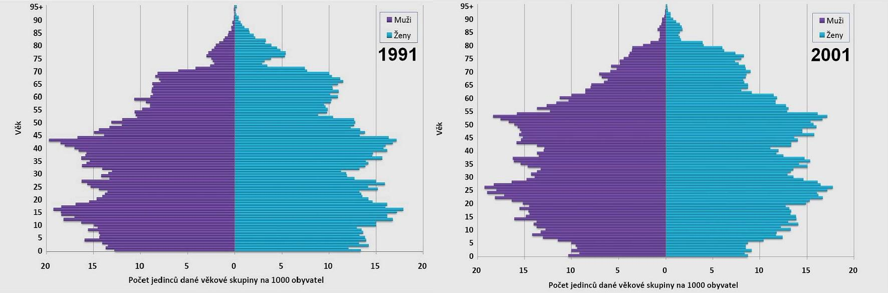 Věková struktura obyvatelstva okresu Most ze sčítání lidu v roce 1991 a 2001